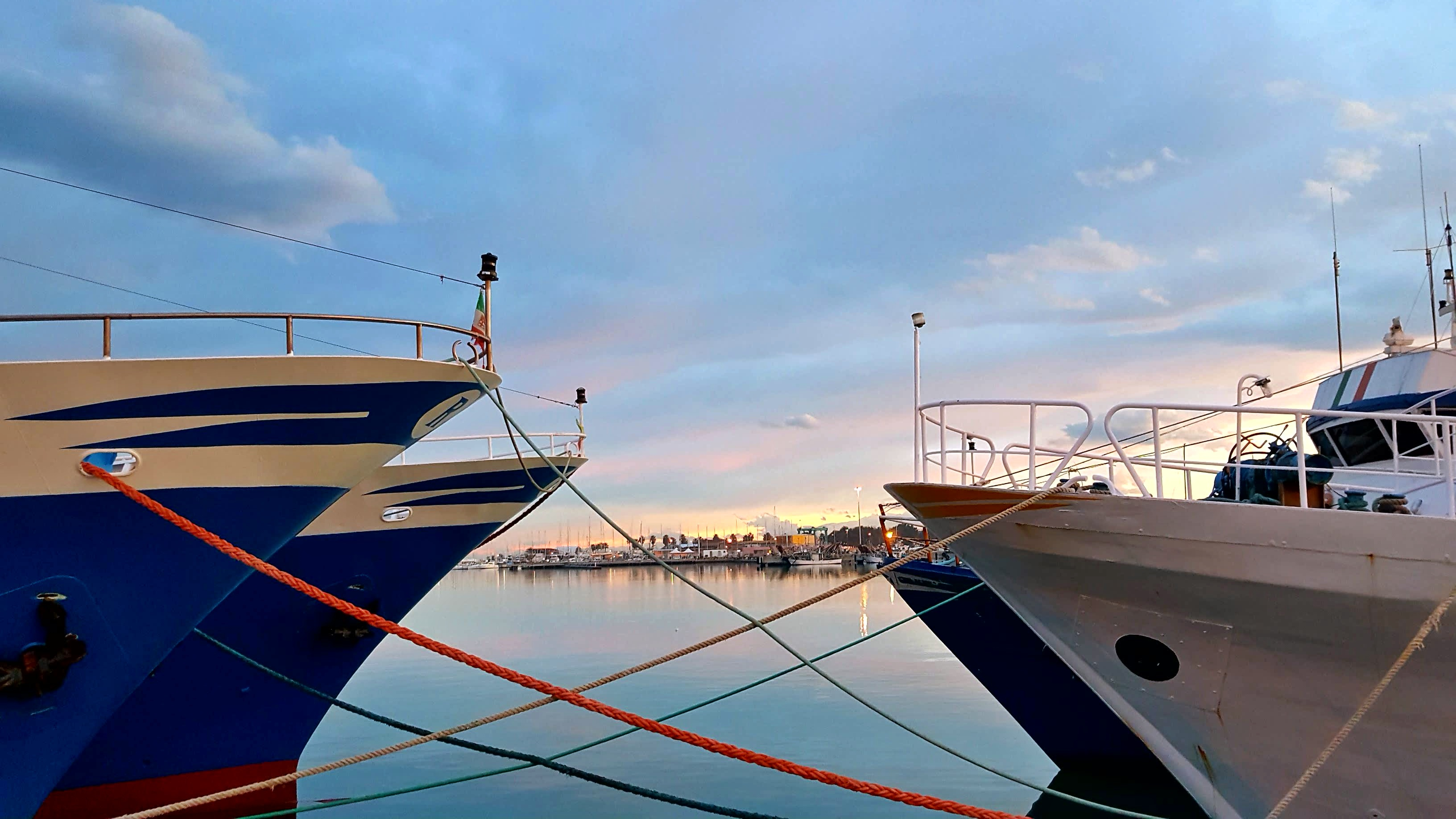 Pescherecci al porto di San Benedetto